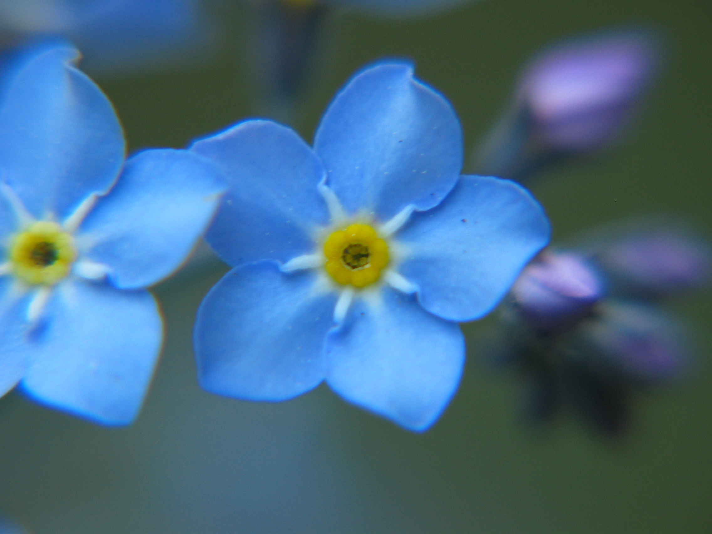 Forget-me-not flower. Stockholm, Sweden.